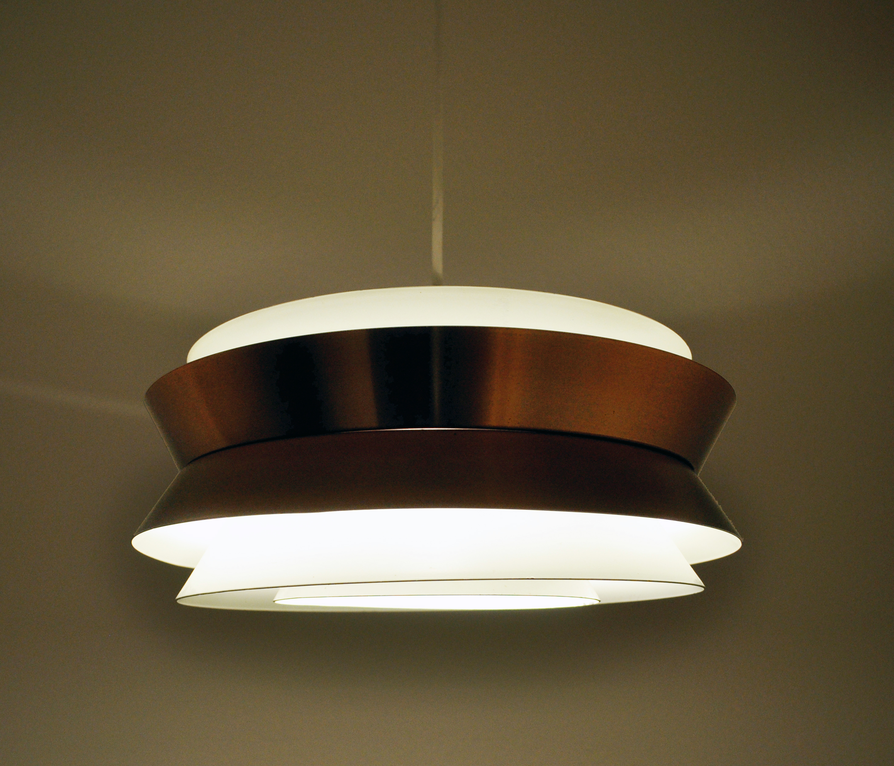 Leuchte VEB Metalldrücker Halle, Modell P 613